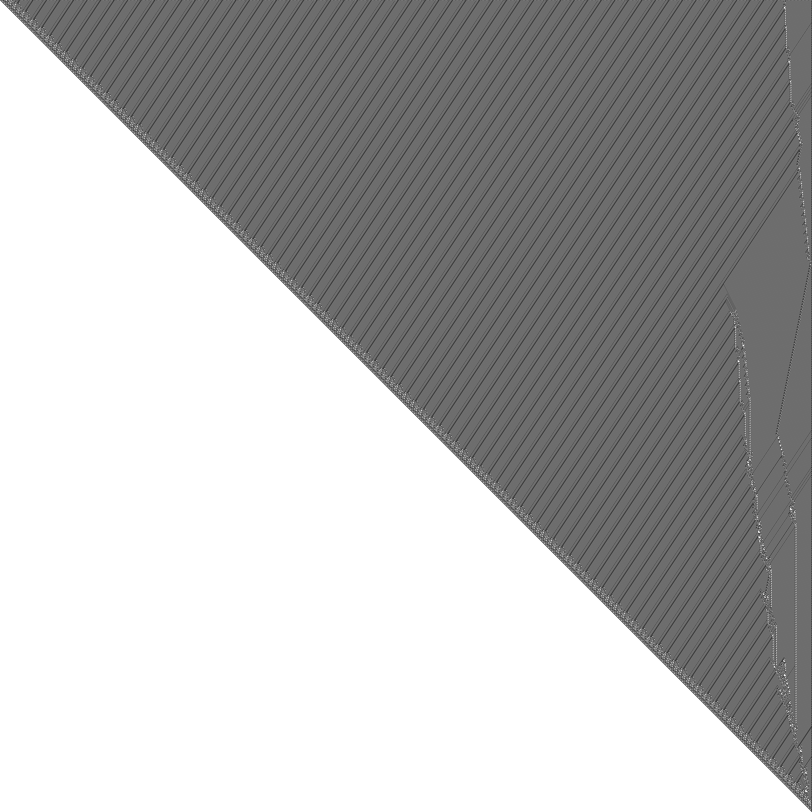 Die ersten 3200 Entwicklungsschritte der Regel 110 des Stephen Wolfram Zellularautomaten (weiße rechte Seite ist abgeschnitten)